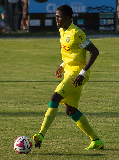 2014: joueur du FC Nantes.